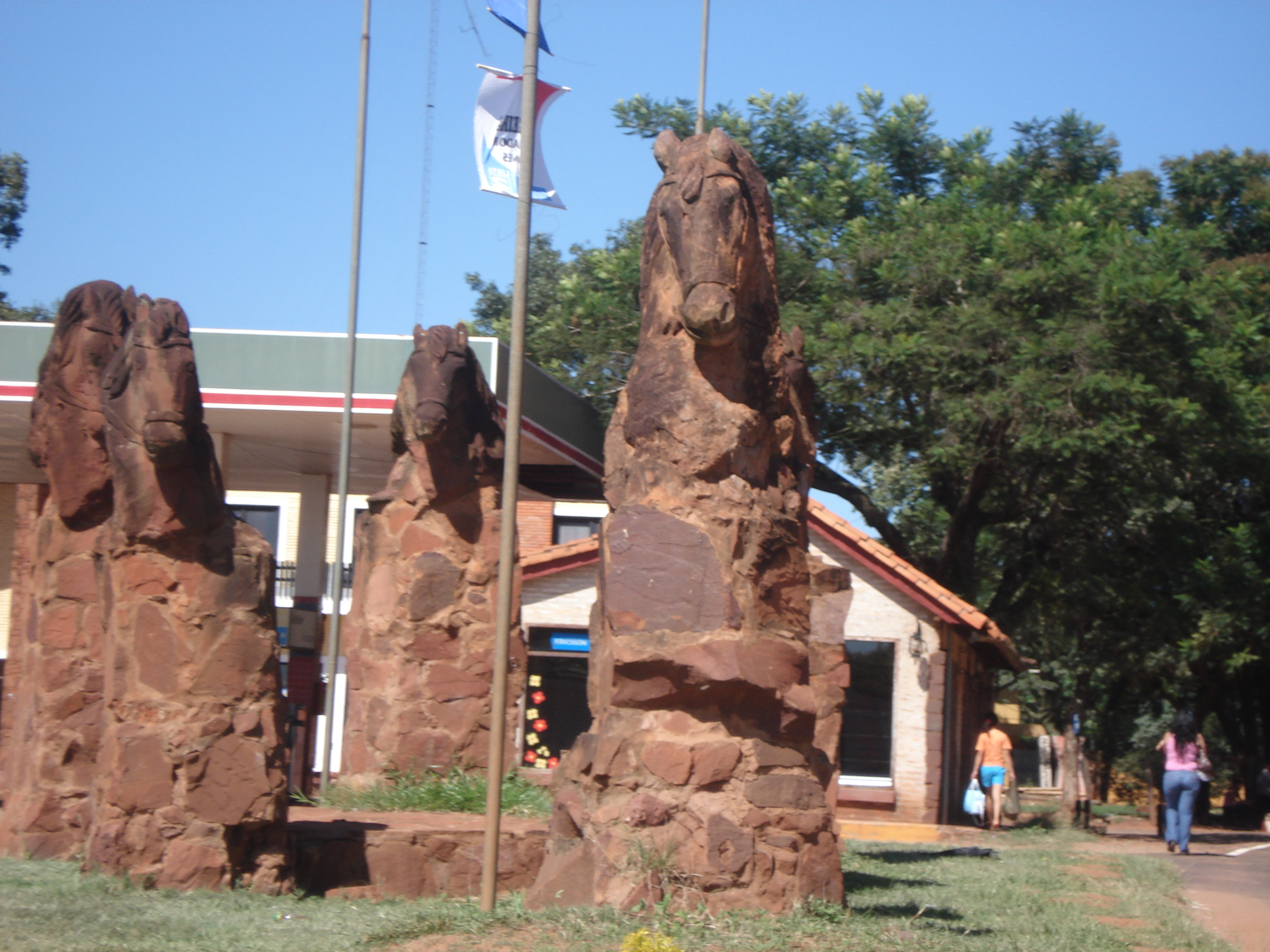 San Juan Bautista Paraguay